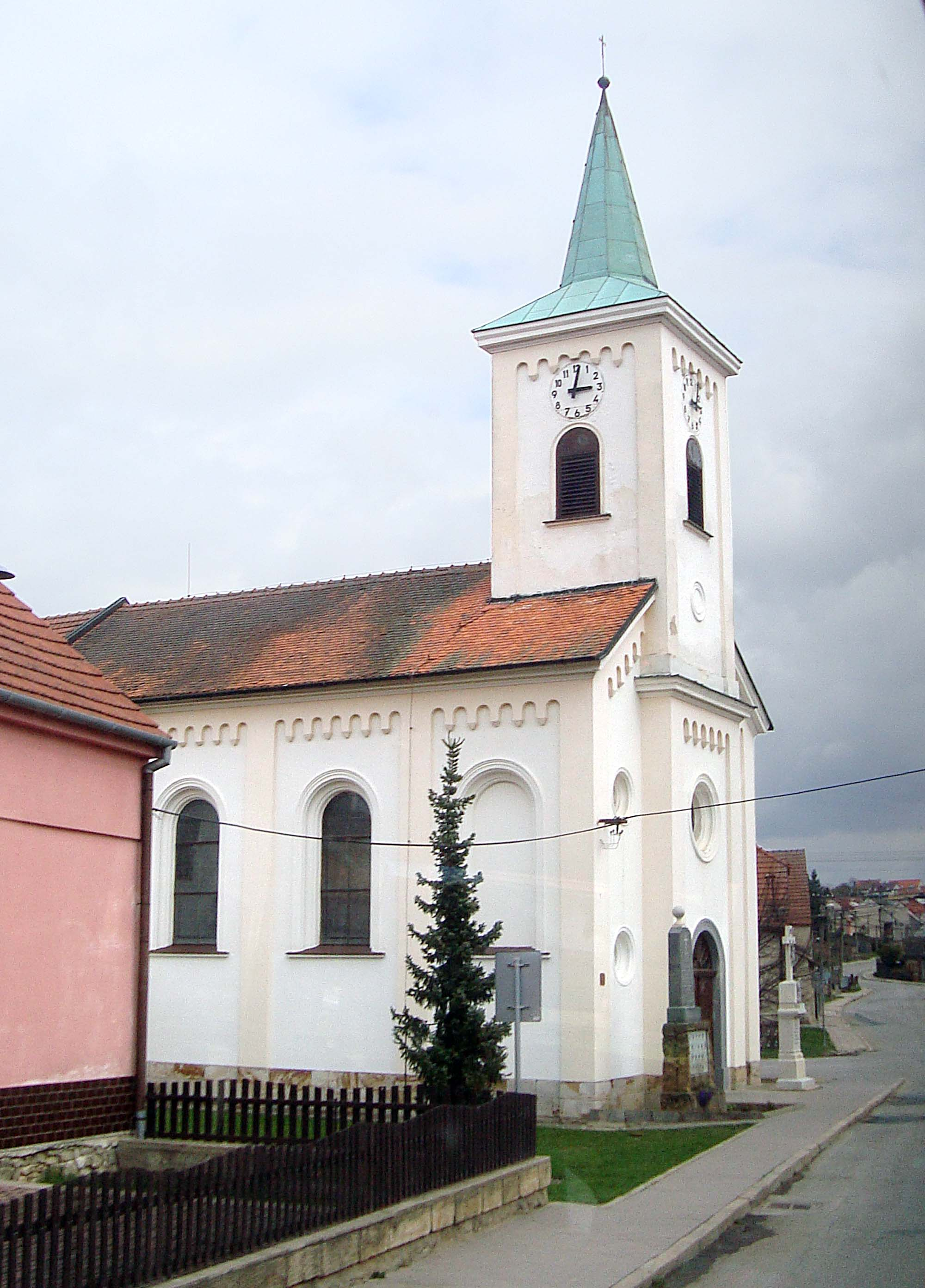 Kaple svatého Donáta v Zakřanech